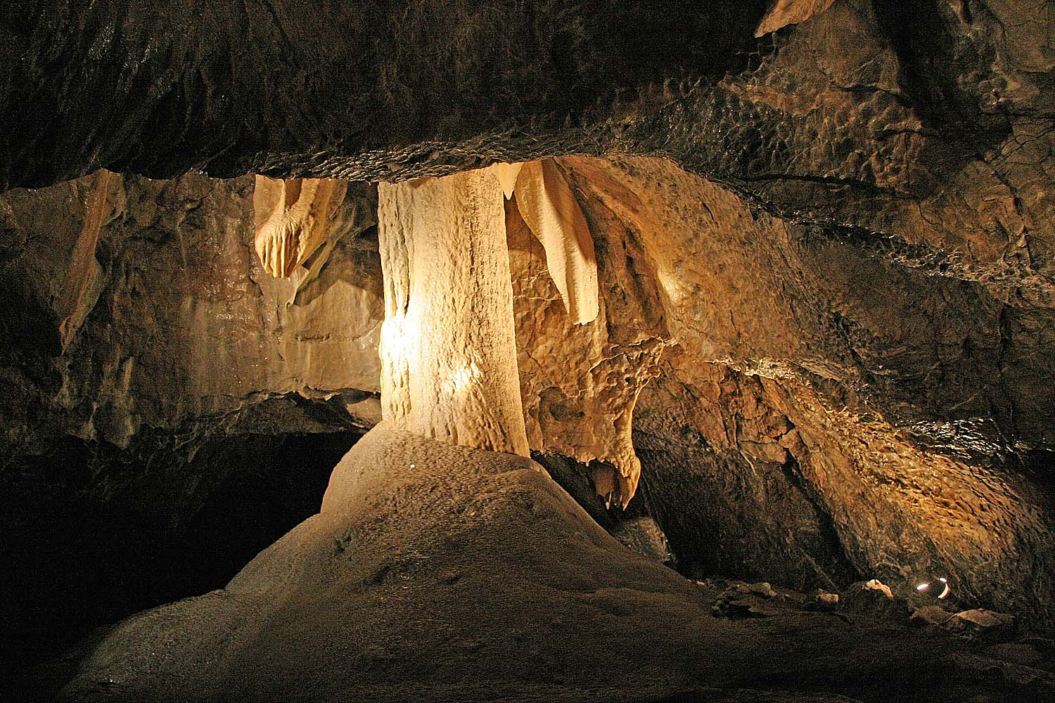 Punkevní jeskyně - stalagnát Anděl